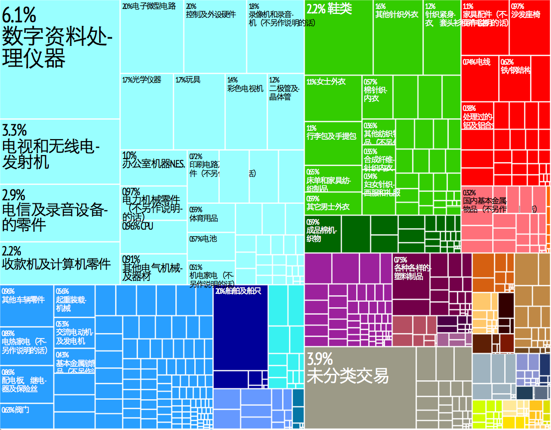 以28种颜色分类描述此国的产品出口，每种颜色盒代表一类产品，其大小代表此产品在此国总出口产品中的比重。